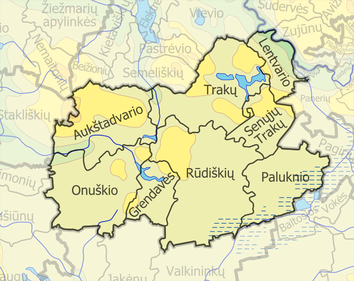 Gmina Troki, podział na starostwa